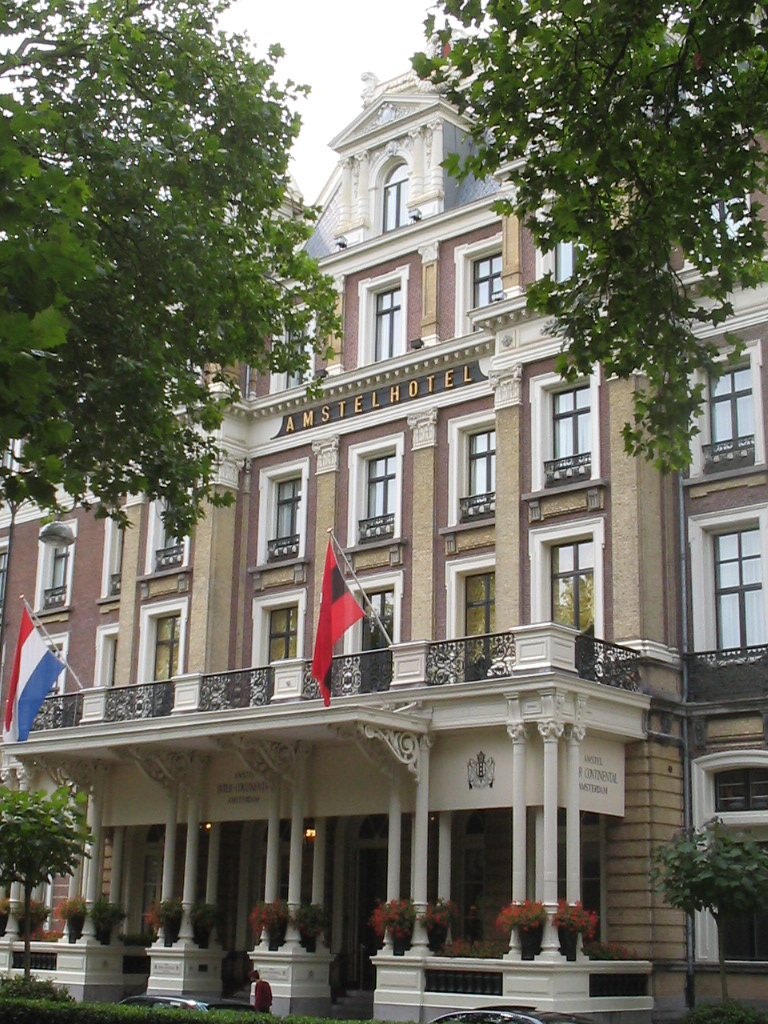 Amstel hotel, Amsterdam, july 2005